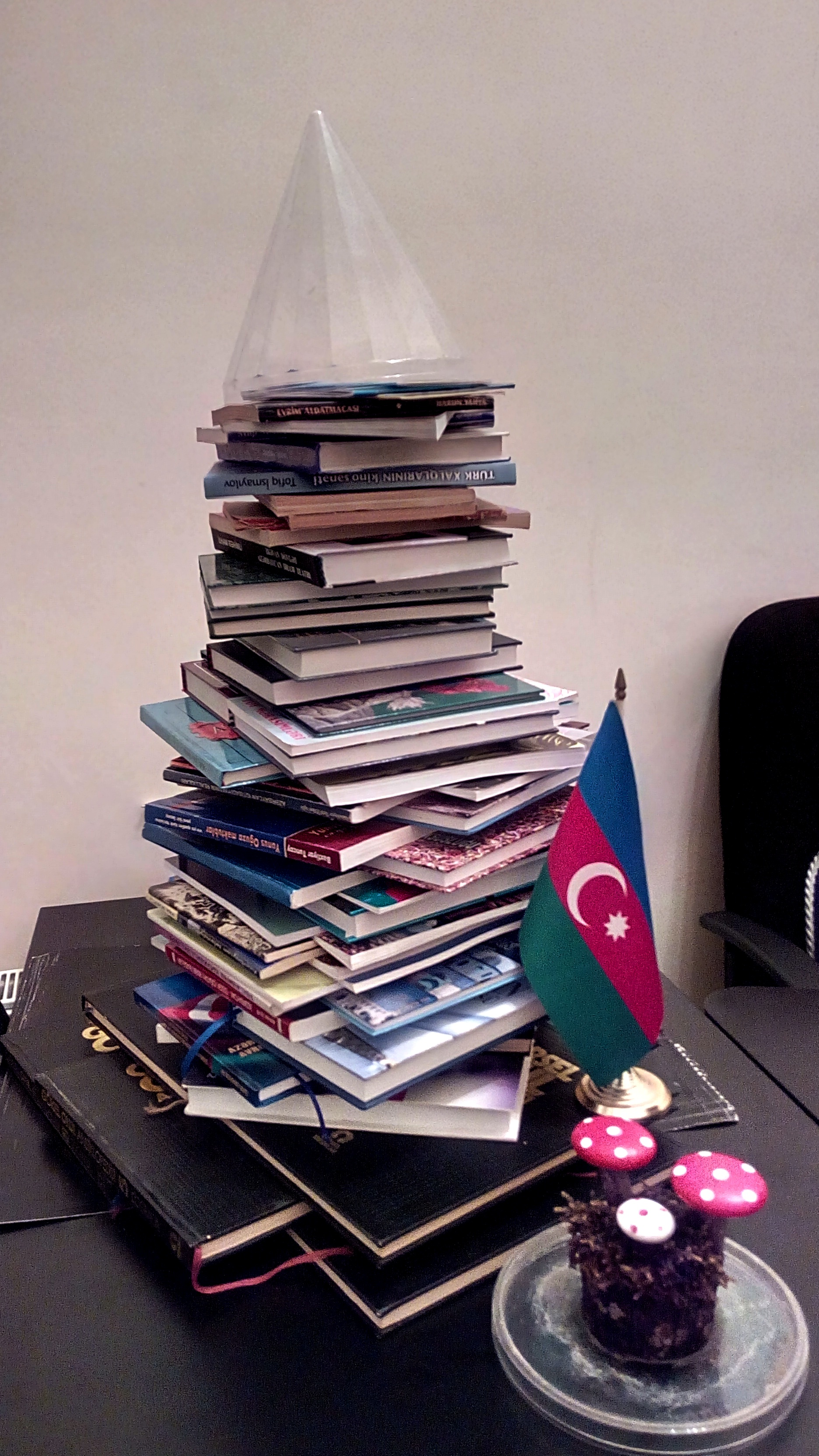 Kitablardan ibarət yolka